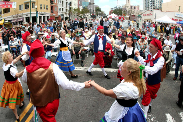 Italianos bailando su tradicional baila, (La Tarantella).